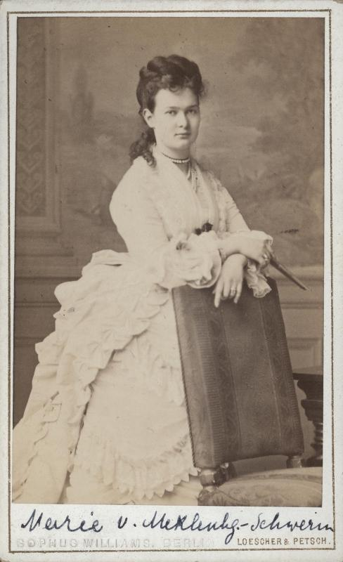 Marie, Herzogin zu Mecklenburg (1854 - 1920)